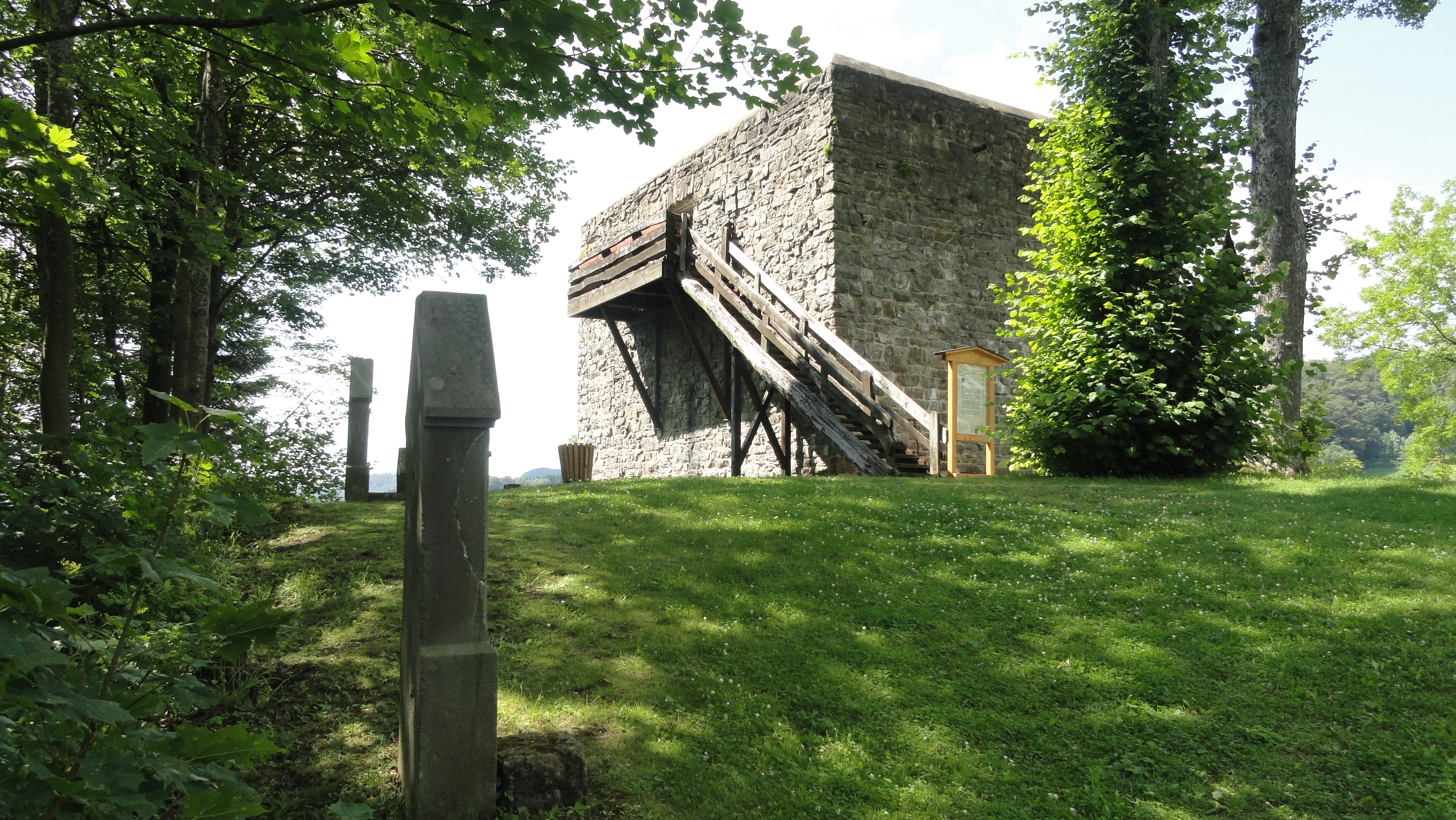 Burgruine Rappelstein in Schmallenberg-Nordenau mit Kreuzweg Bildstöcken This is a photograph of an architectural monument.